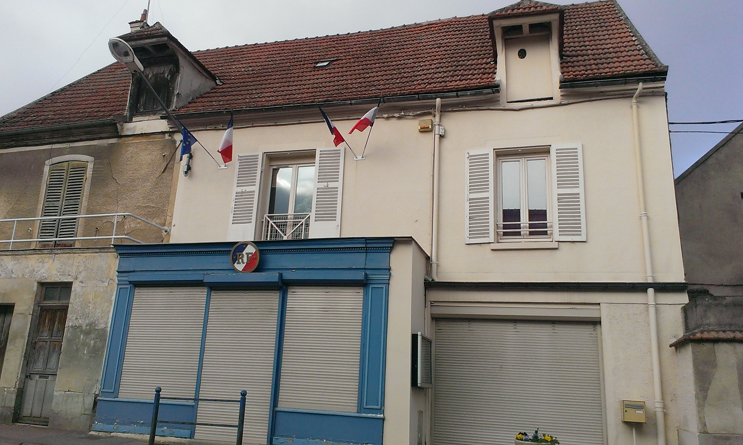 Mairie de Villiers sur Morin (77)